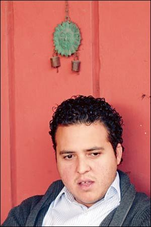 Arnoldo Gálvez Suárez in elPeriódico